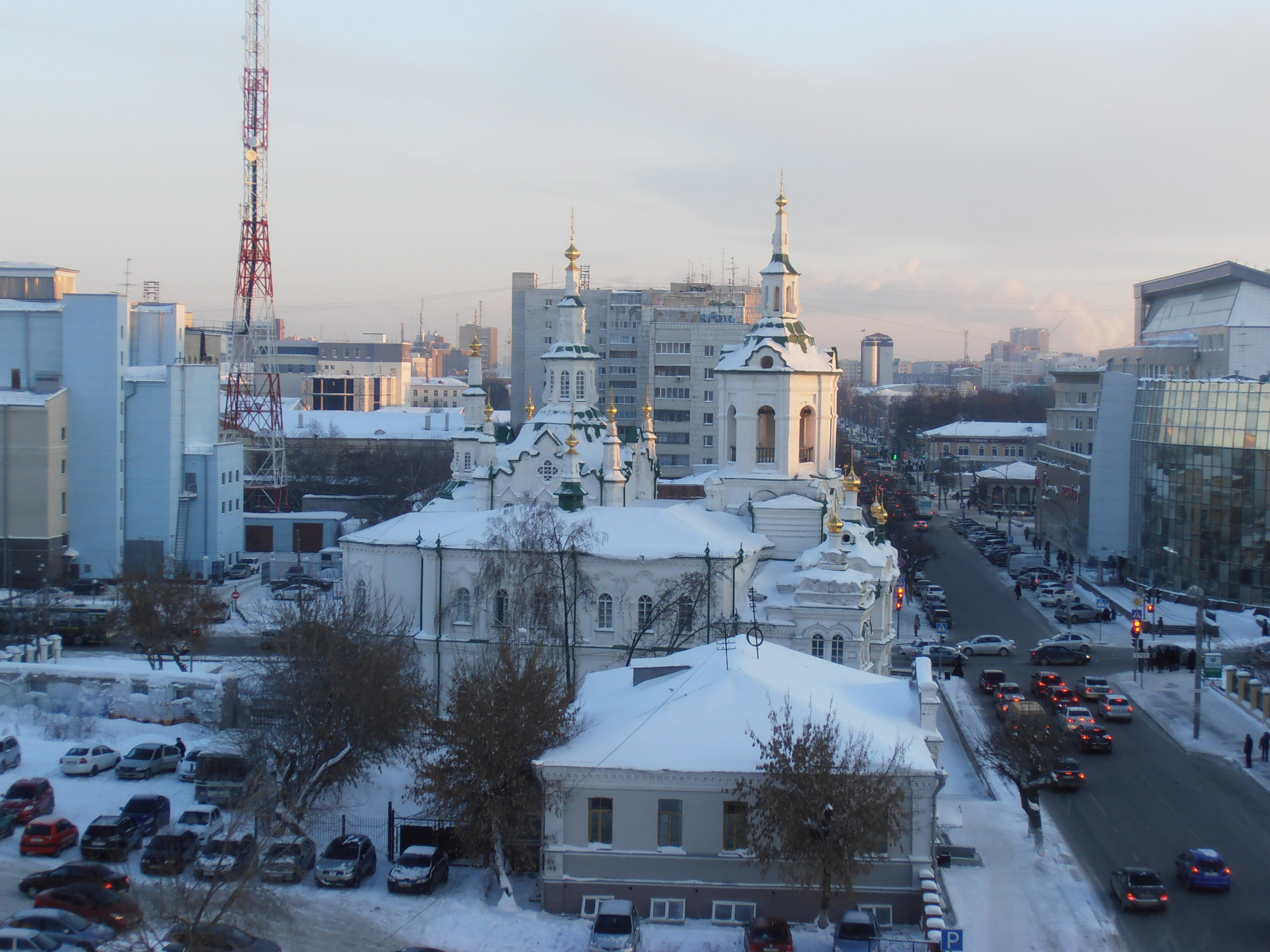 Вид на Спасскую церковь в Тюмени со стороны улицы Кирова.